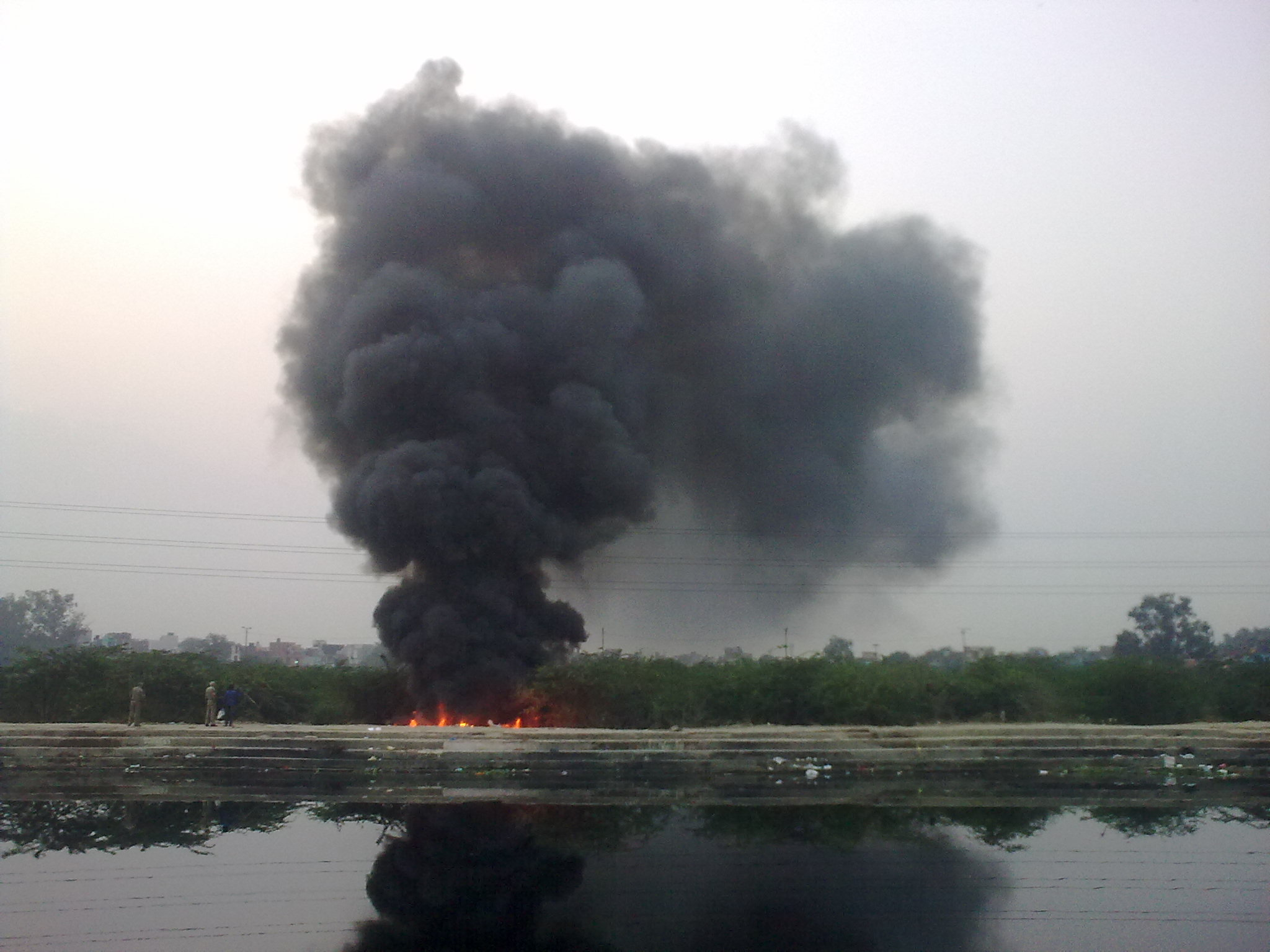 തീയും പുകയും